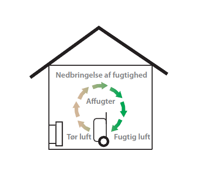 Kondenstørring.